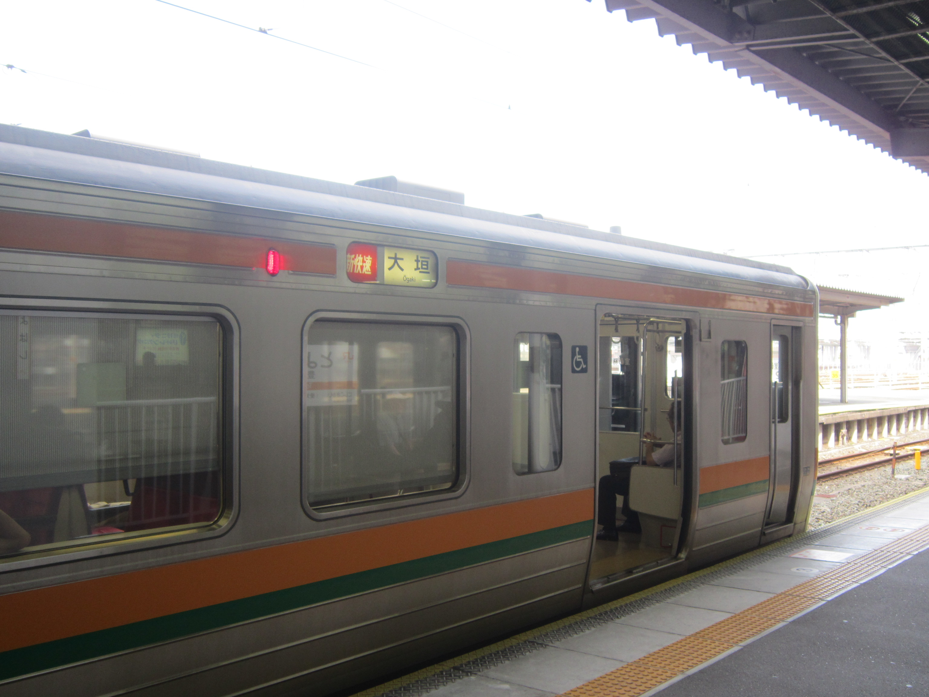 211系0番台の新快速